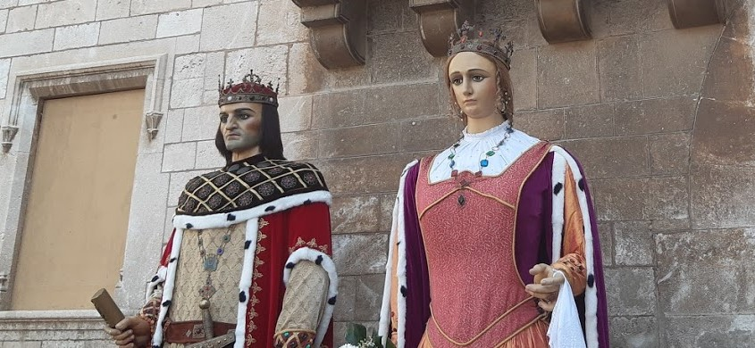 Imatge dels Gegants de Vilafranca.